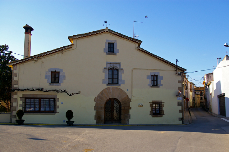 Riudarenes (La Selva, Catalunya)